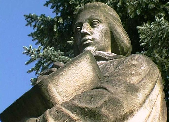 George Tranoscius (1592-1637), Lutheran songwrither of Czech and Latin hyms. Statue in Třanovice (Czech republic) Jiří Třanovský (1592-1637), evangelický skladatel českých a latinských duchovních písní. Socha v Třanovicích.